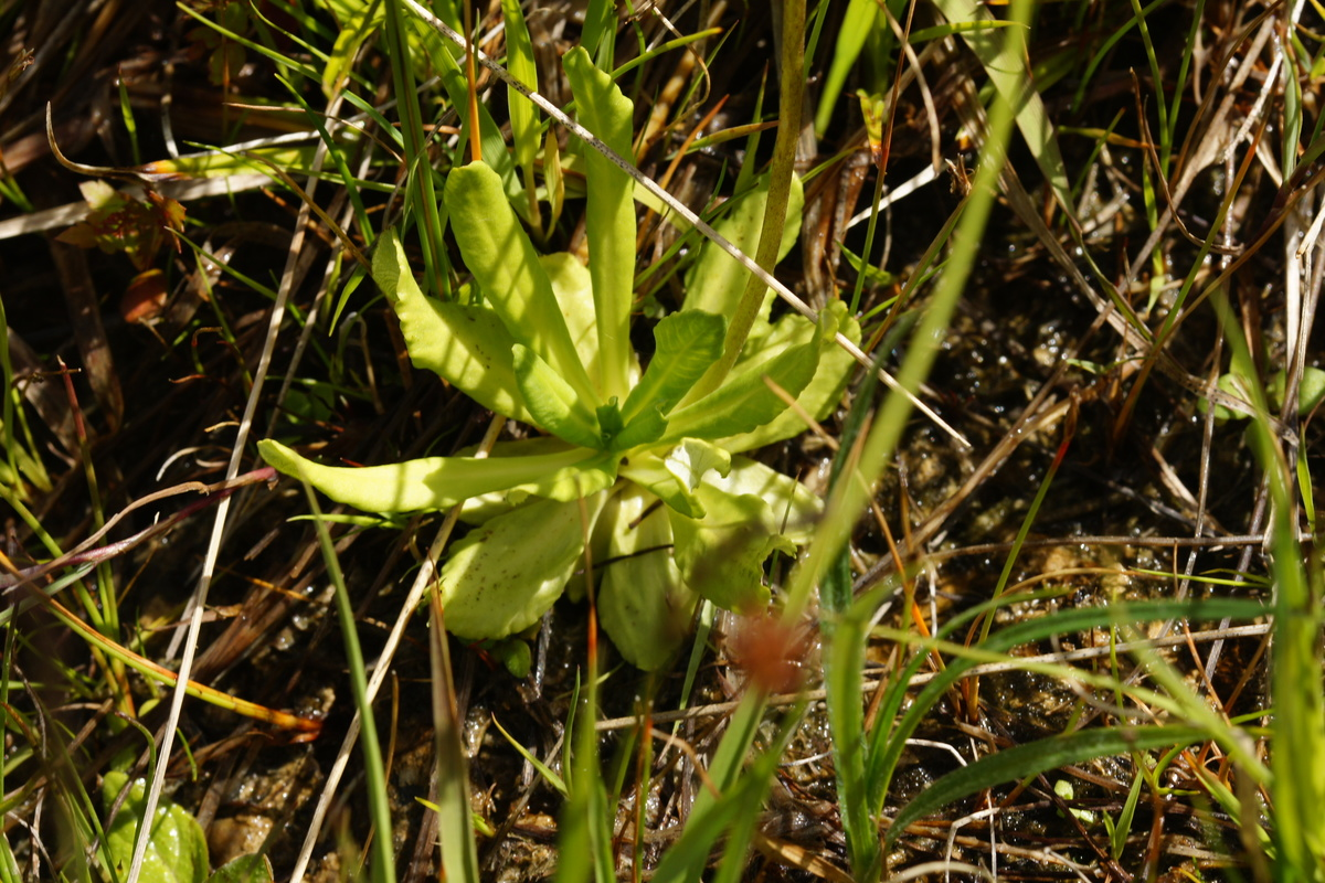 Moknati jeglič na Vitrancu.